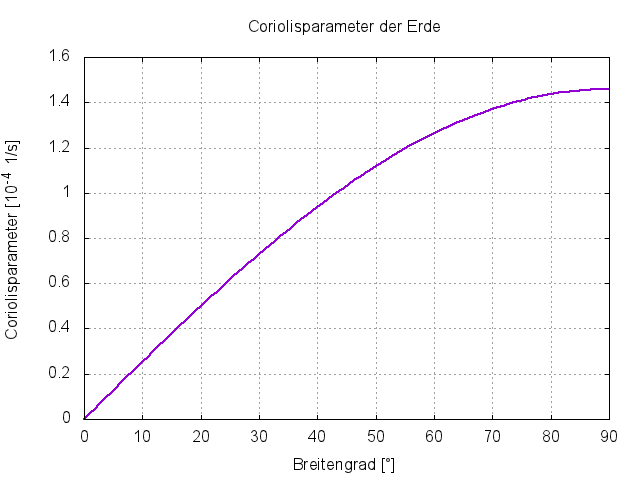 Darstellung des Coriolisparameters abhängig vom Breitengrad